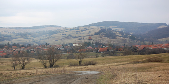 Die Ortschaft Kirchberg (Chirpăr) in Siebenbürgen.